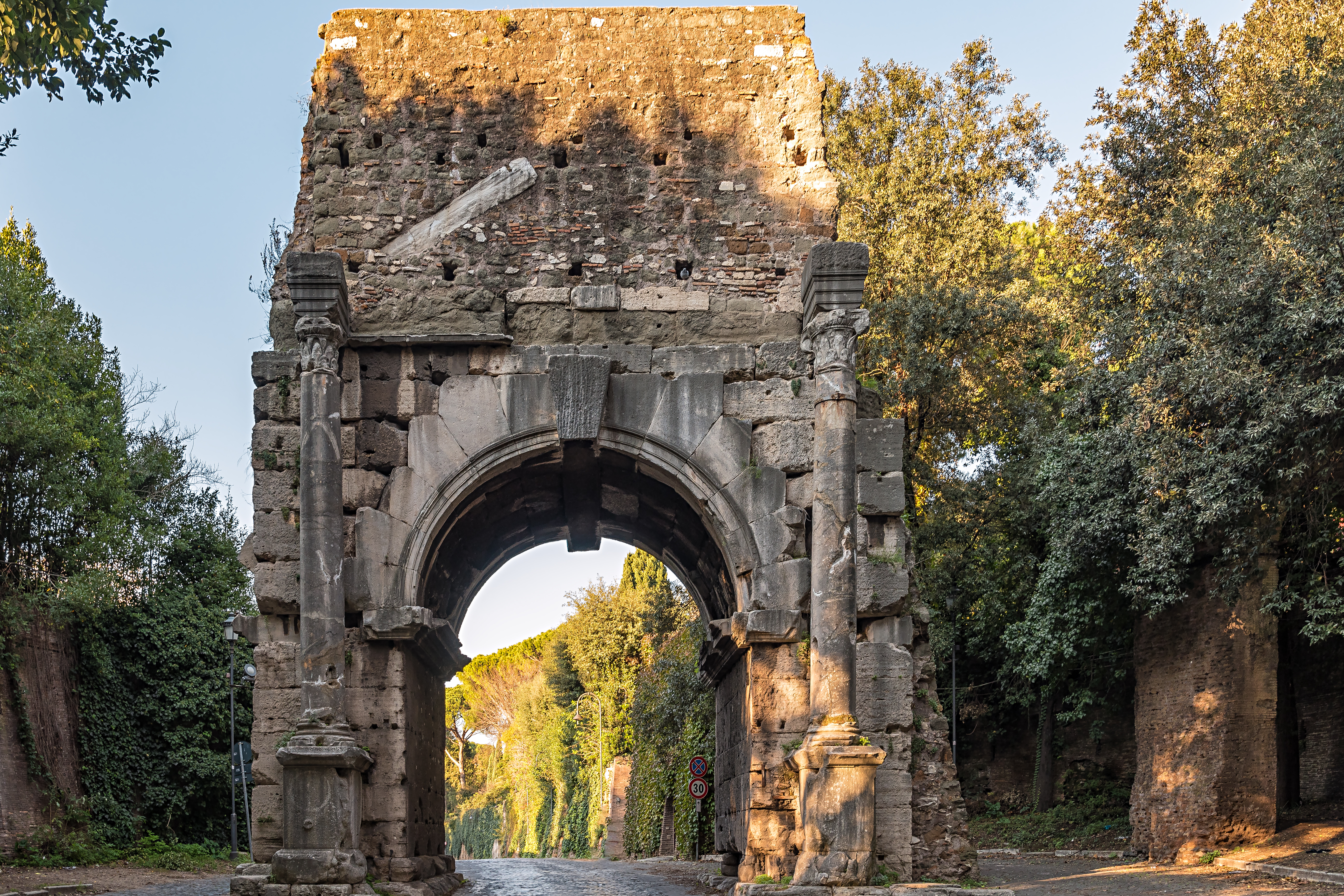 Der Drususbogen hinter der Porta San Sebastio gesehen